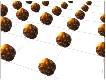 Calabi-Yau-Mannigfaltigkeiten an jedem Punkt der Raumzeit